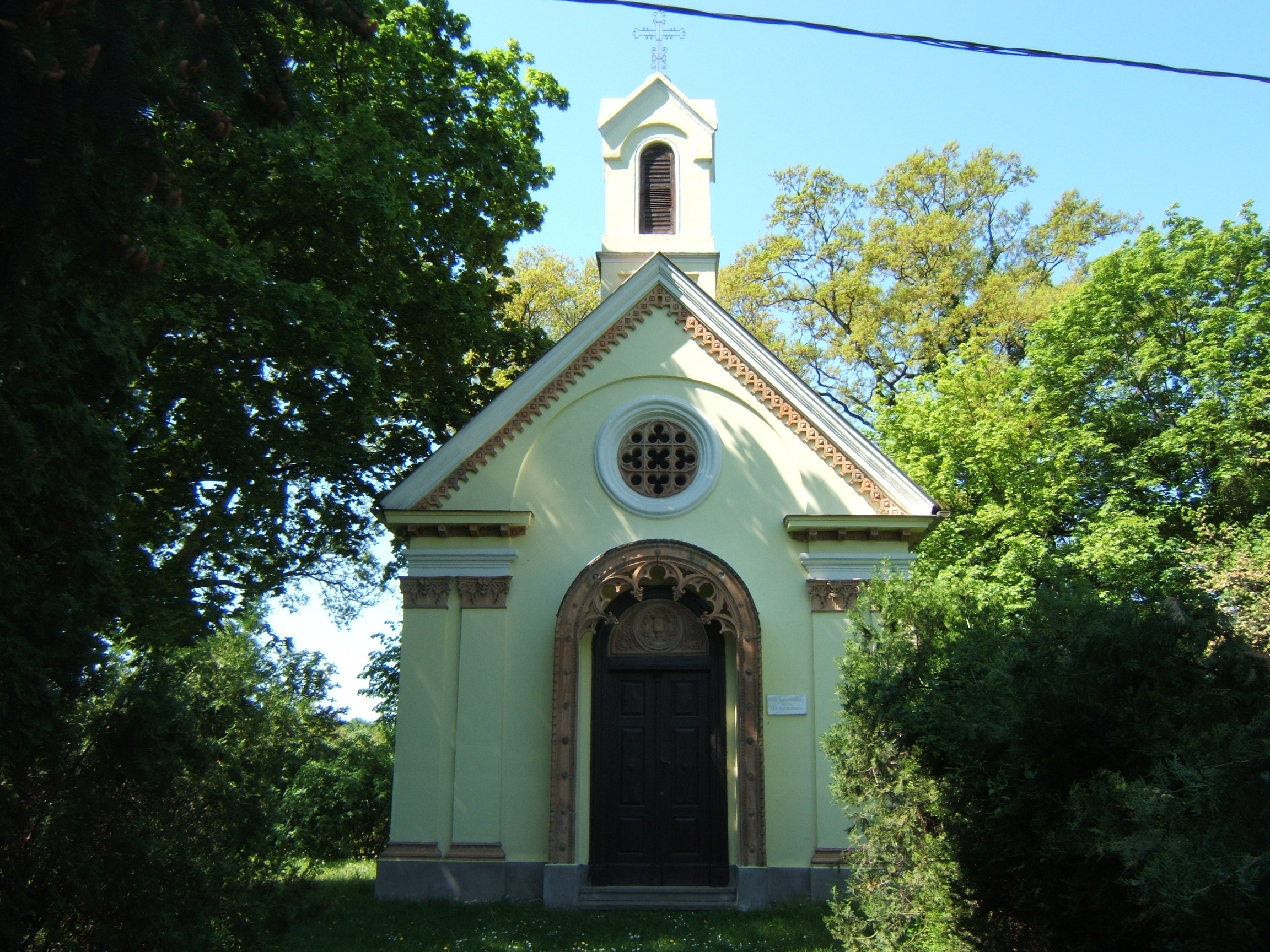 Szarkavári kápolna